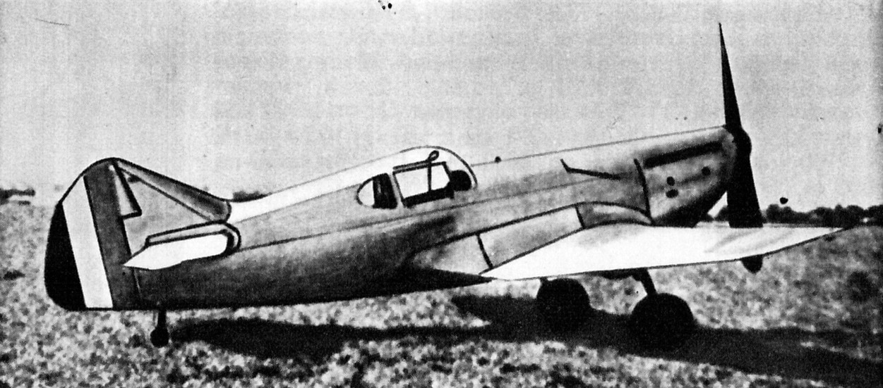 Francuski samolot myśliwski Dewoitine D.520.